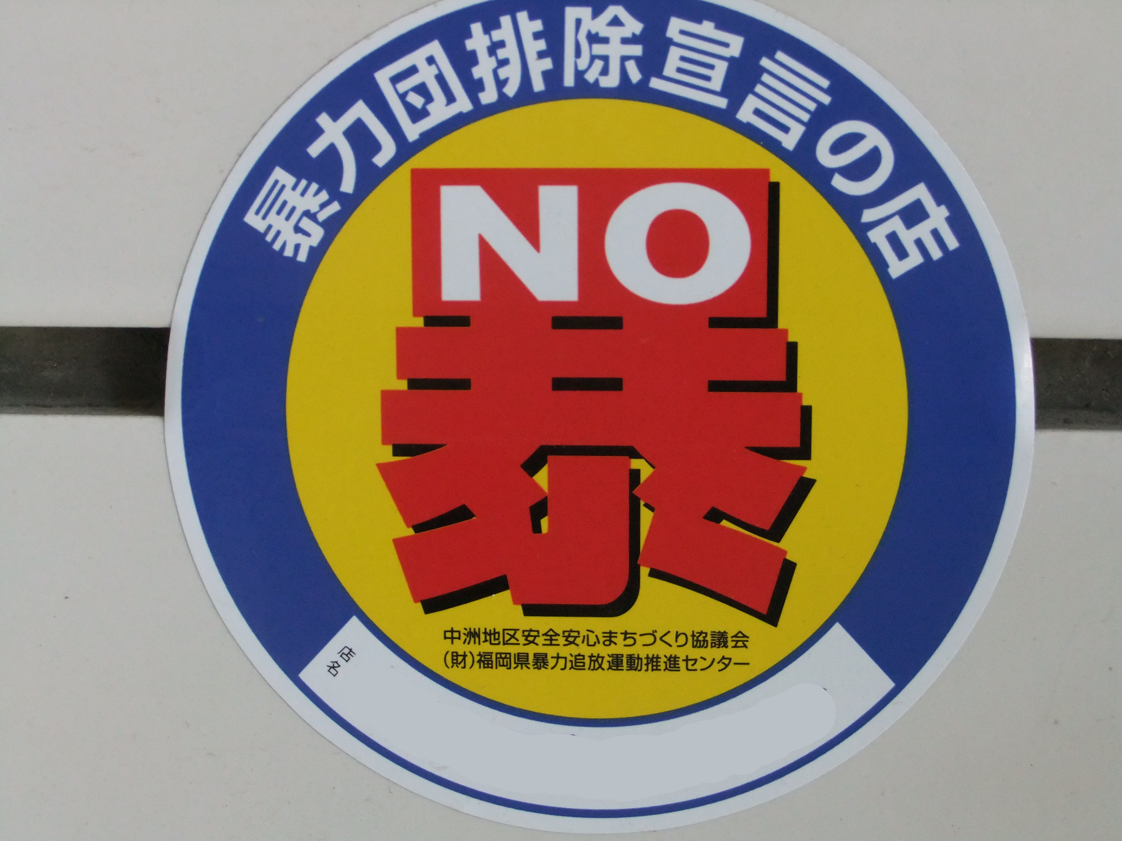 福岡市博多区中洲で撮影 レタッチ済み